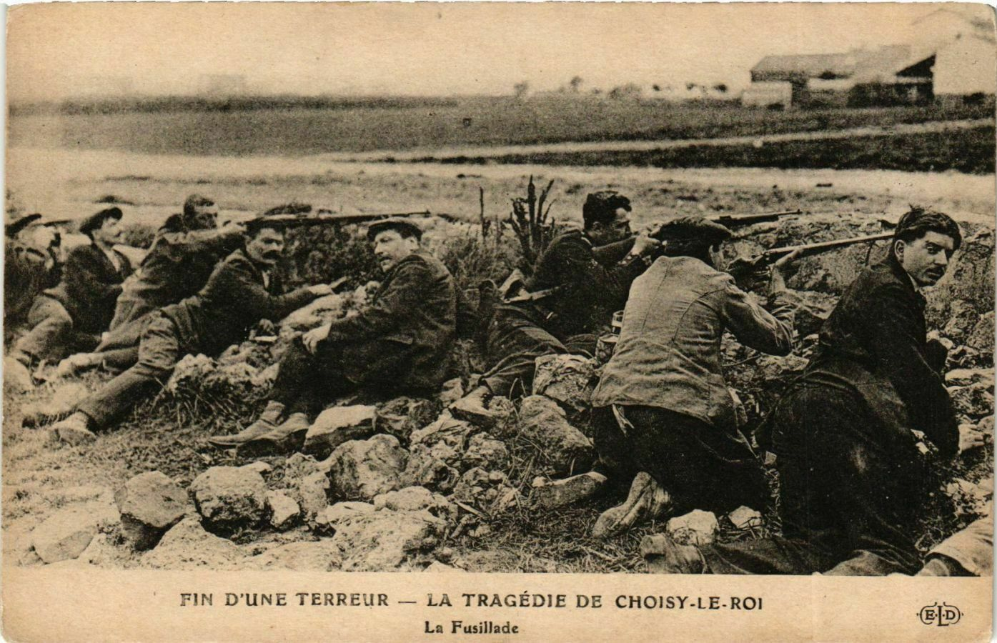 foto de jornal sobre o cerco ao anarquista Bonnot